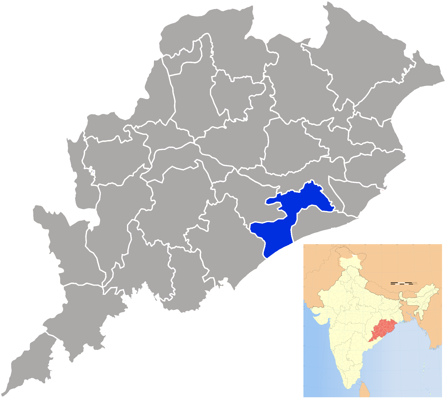 Distrito de Khordha en Orissa